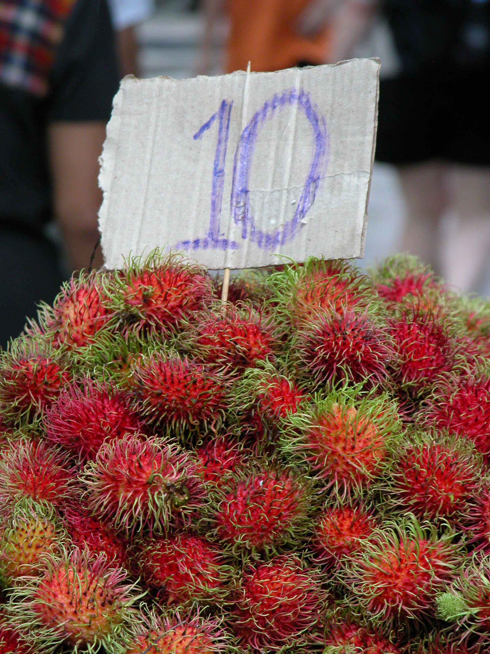 Rambutan Nephelium lappaceum fruit for sale in a Bangkok market